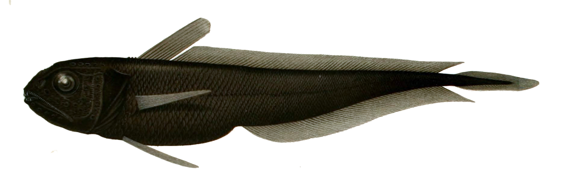 Melanonus gracilis